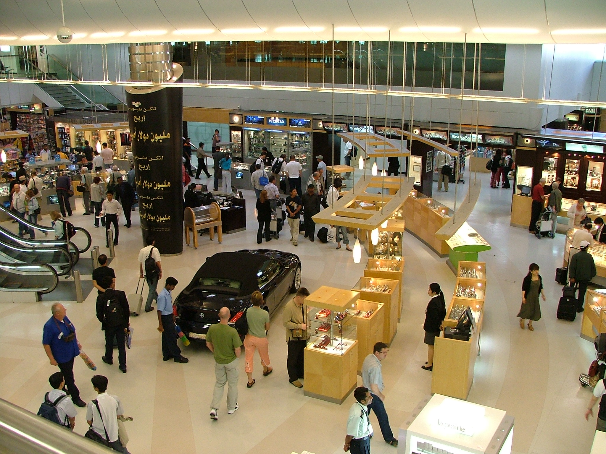 Doha - airport in 2007.